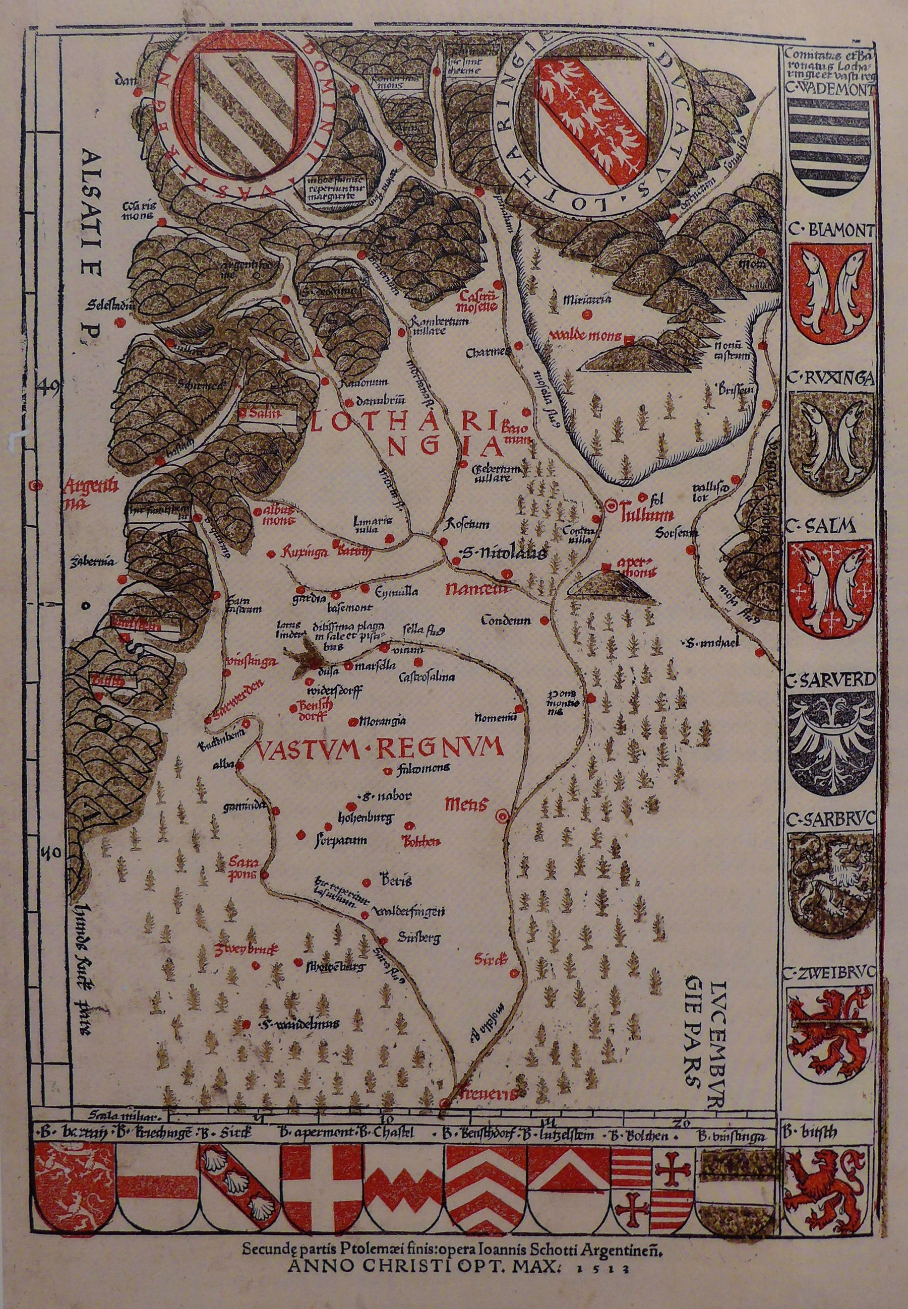 Martin Waldseemüller: Lothringenkarte von 1513 (Landesarchiv Saarbrücken, Sammlung Hellwig)